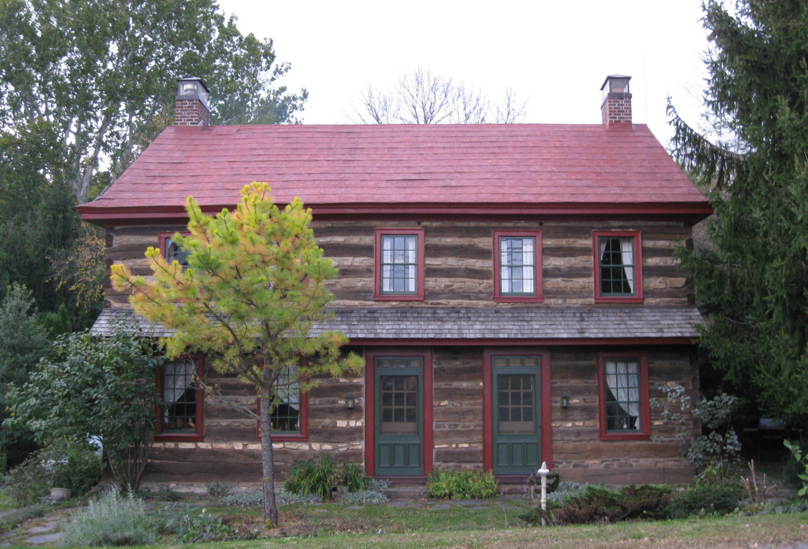 Trexler, Pennsylvania